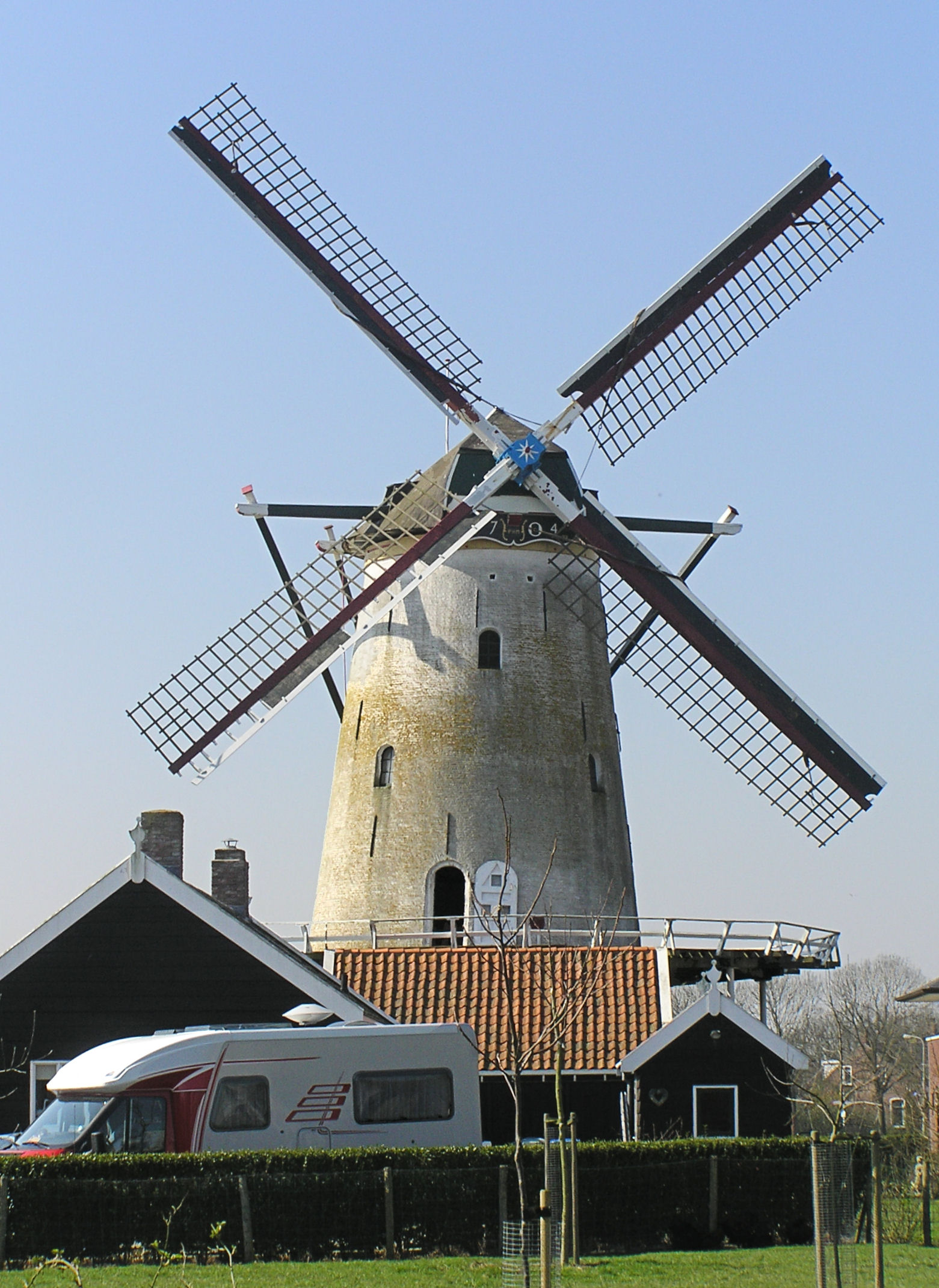 Kloetingse molen